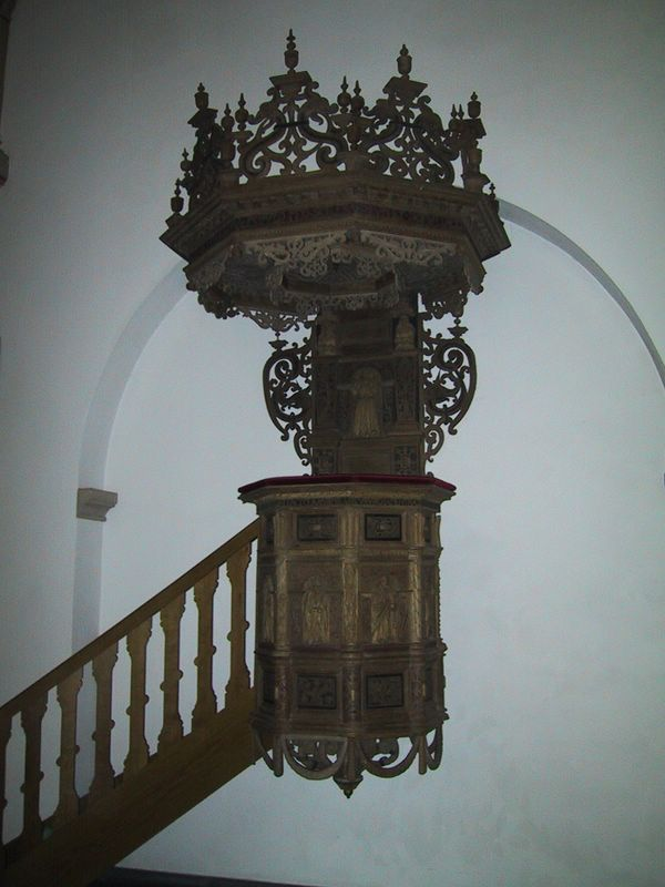 Kanzel in der Pfarrkirche St. Blasius Balve